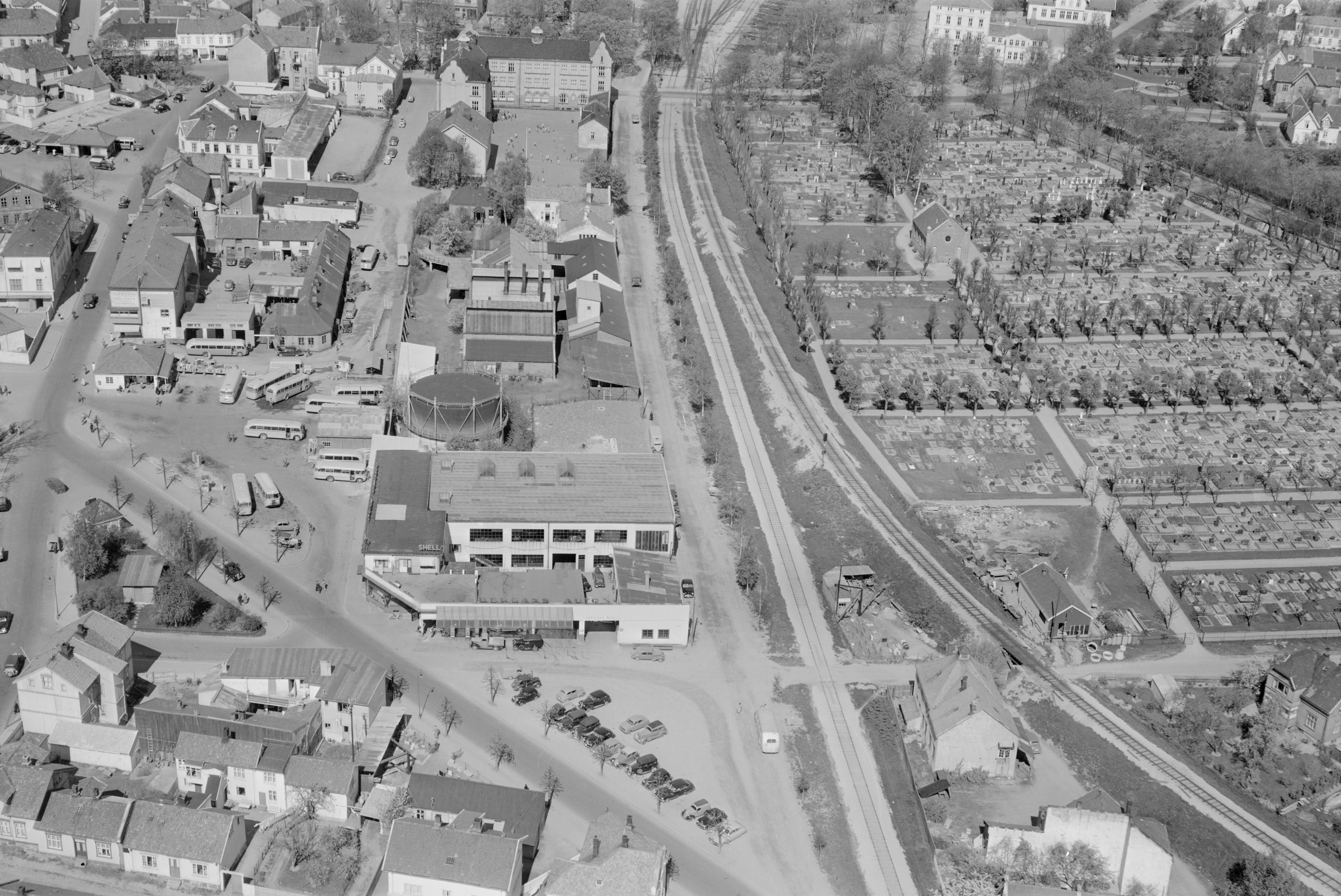 WF.S.50927